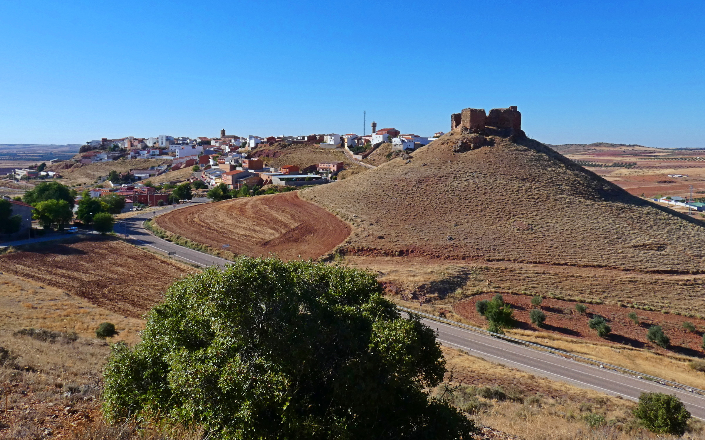 Este pequeño pueblo de Ciudad Real (1.009 habitantes) se llama así: Alhamrba, igual que el famoso palacio de La Alhambra de Granada. "alhamrah" en árabe significa "la roja". En esta población el nombre se lo dieron también los árabes cuando la ocuparon y se debe al color predominante de las tierras circundantes. El castillo original fue construido por los árabes sobre un cerro contiguo y se encuentra en ruinas.